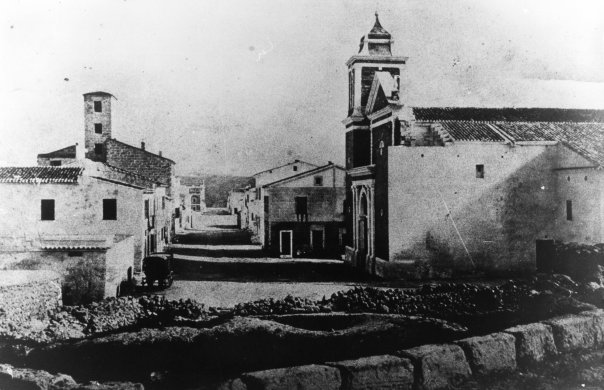 Iglesia d'es Rosari y calle Victori, principios del siglo XX (Es Castell). Church of es Rosari and Victori street, beginning of 20th century (Es Castell).